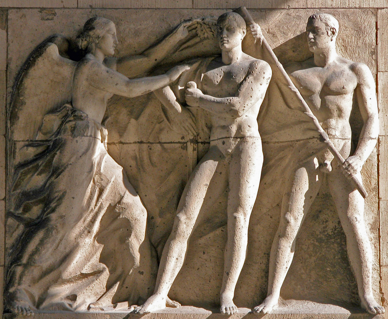 Braunschweig: „Akademie für Jugendführung“, Relief „Ehre“ in der „Ehrenhalle“. Brunswick, Germany: “Akademie für Jugendführung”, „Honor“-relief in „Honor Hall“.